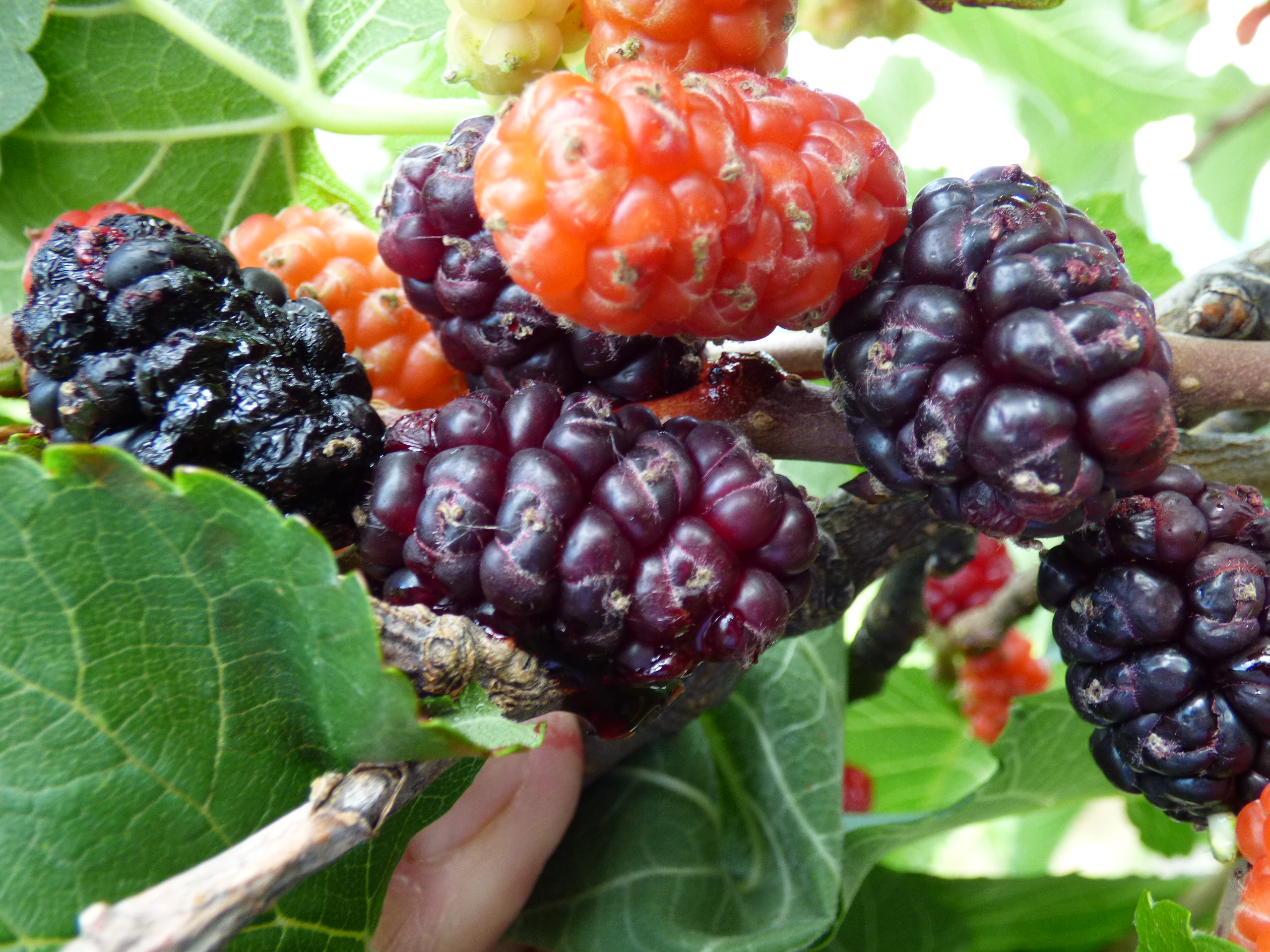 Zrelé plody moruše čiernej v Pukanci.